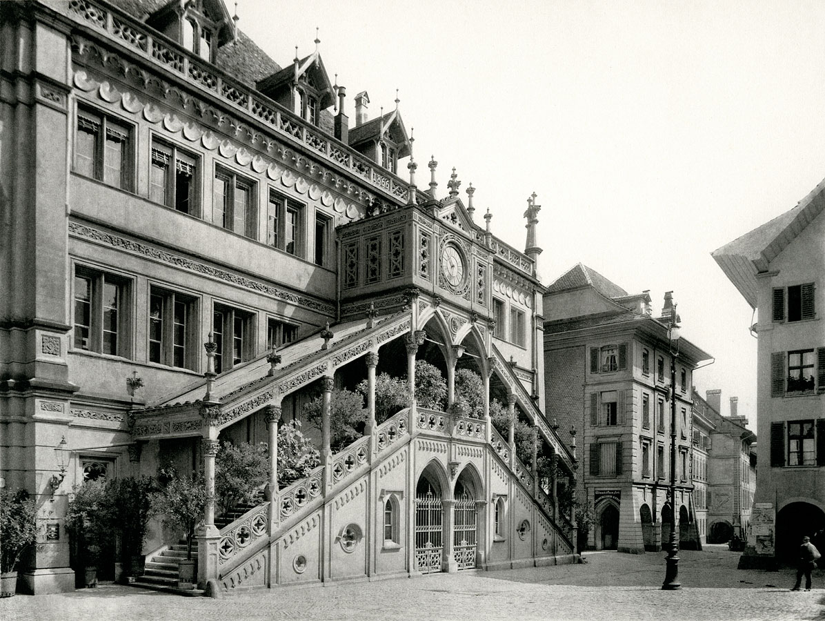 Rathaus des Kantons Bern. Erbaut 1406—1416 von Heinrich von Gengenbach und Hans Hetzel, restauriert 1865 von Friedrich Salvisberg.